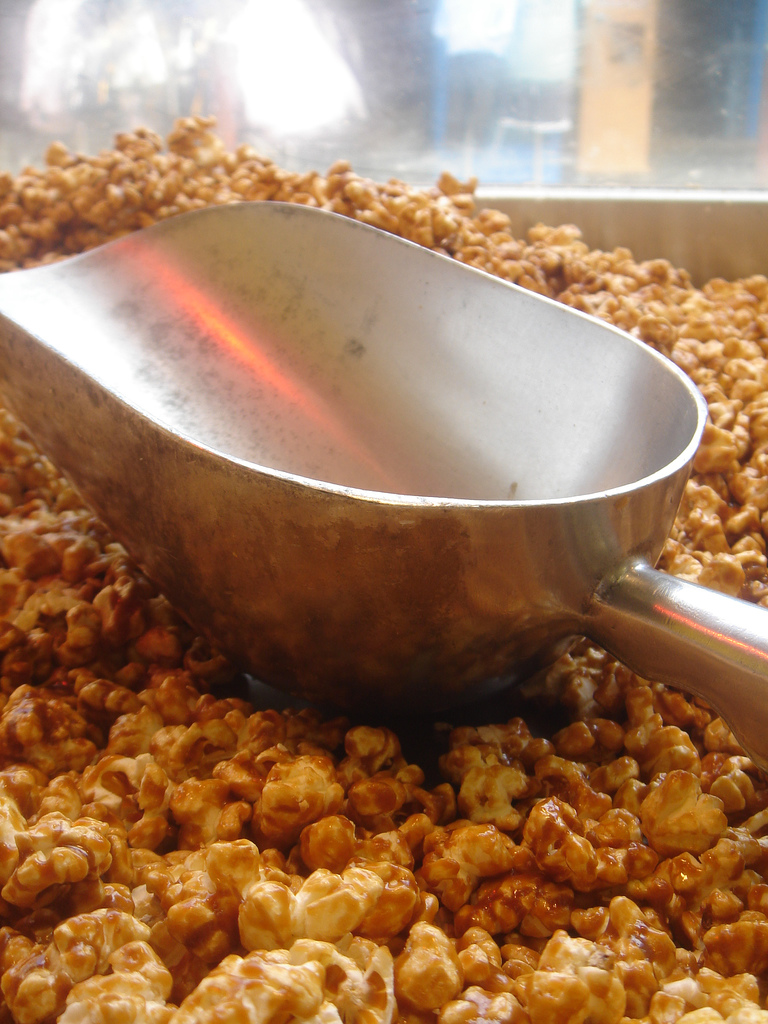 caramel corn